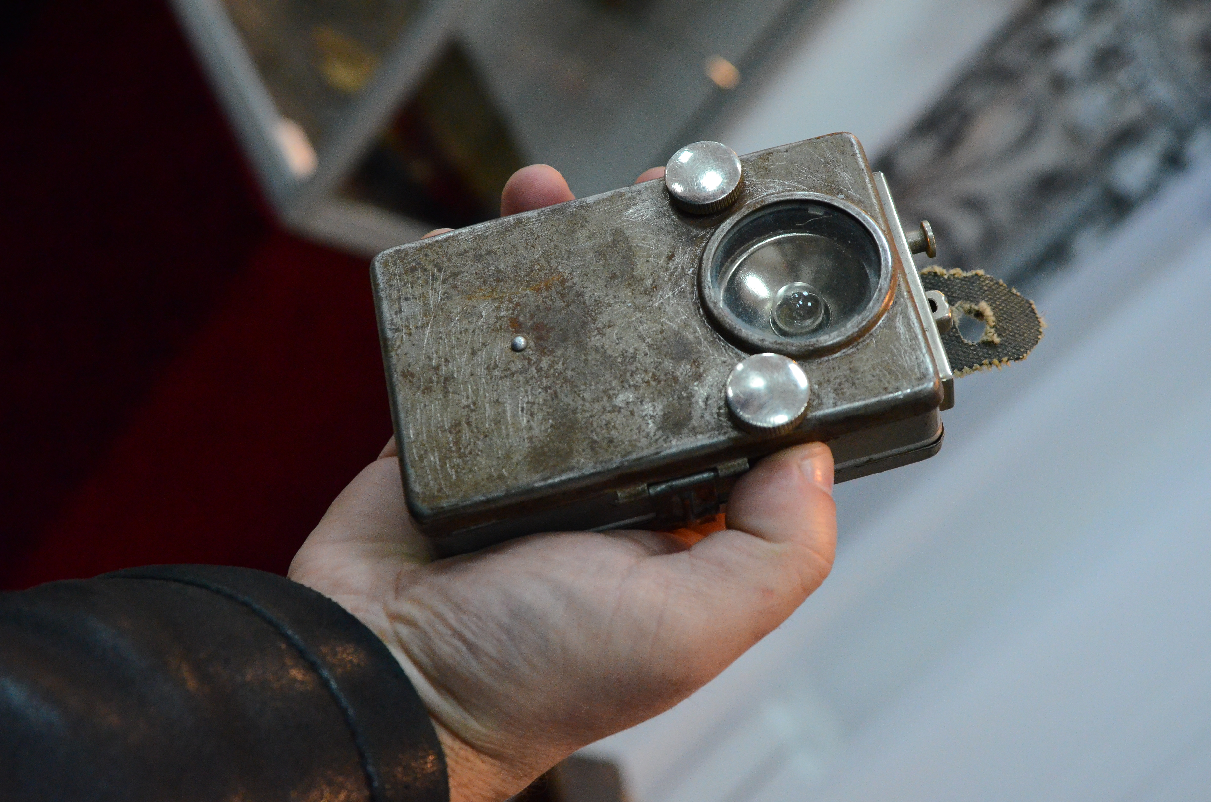 Музей историии и развития Донецкой железной дороги